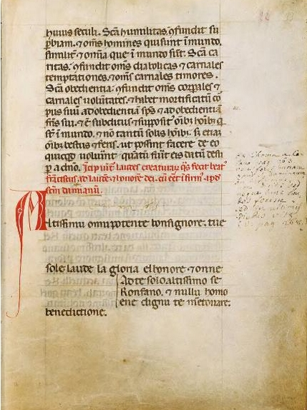 Riproduzione dal Codice 338, f.f. 33r - 34r, sec. XIII - Biblioteca del Sacro Convento di San Francesco, Assisi page 1